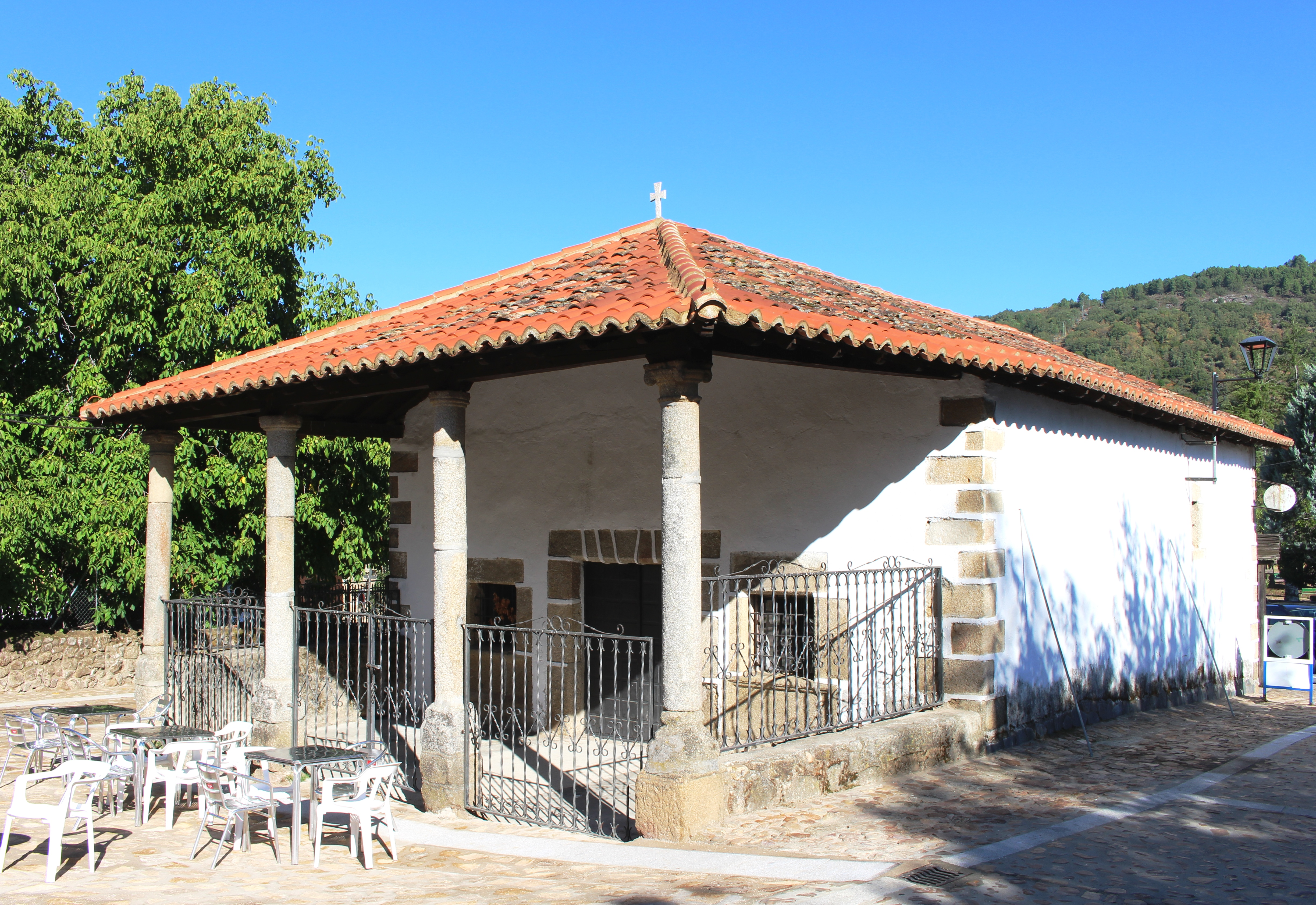 Ermite de Cepeda, Salamanca